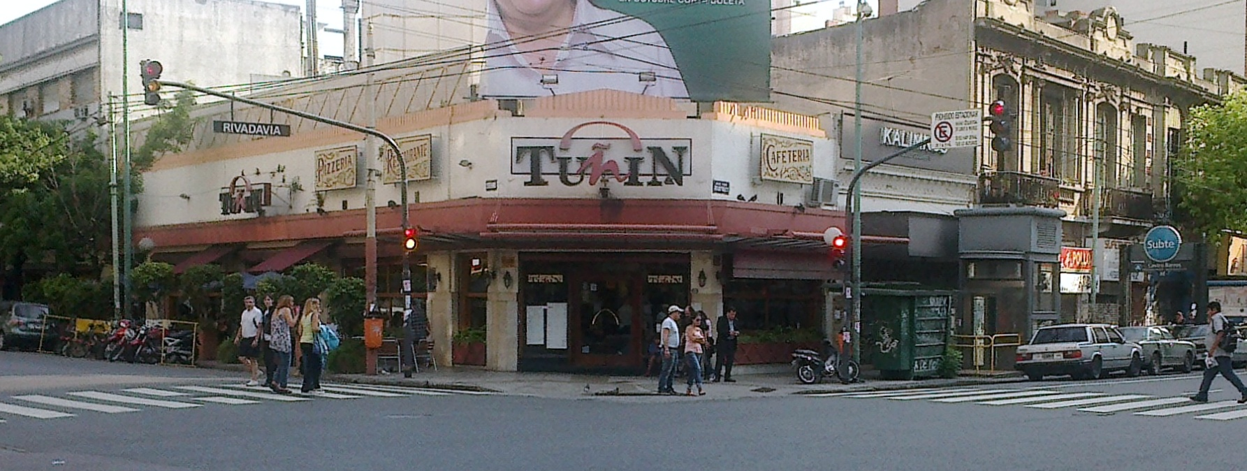 Bar Tuñín, en Avenida Rivadavia y Castro Barros, Almagro, Buenos Aires, Argentina.